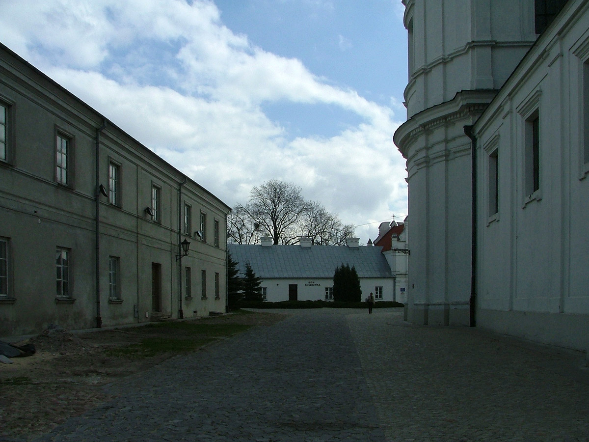 Chełm, Sanktuarium Maryjne na Górze Chełmskiej - Klasztor Bazylianów